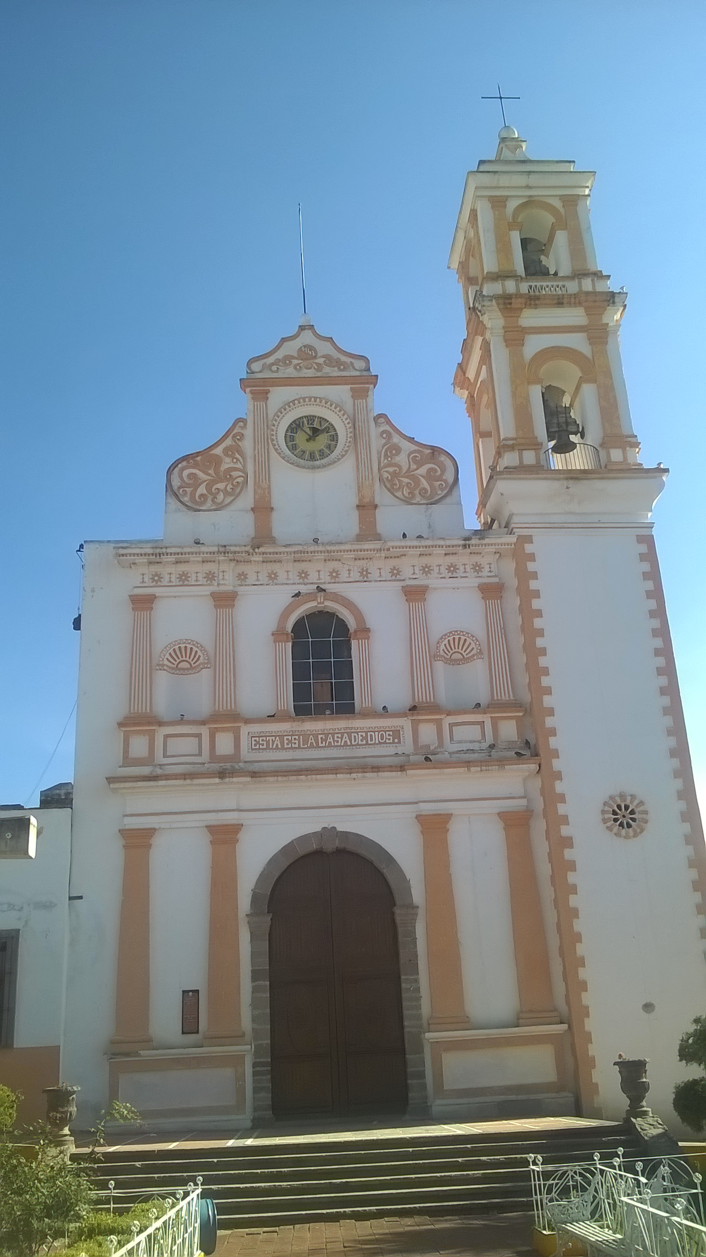 Parroquia de Santiago Apóstol, Atlzayanca, Tlaxcala